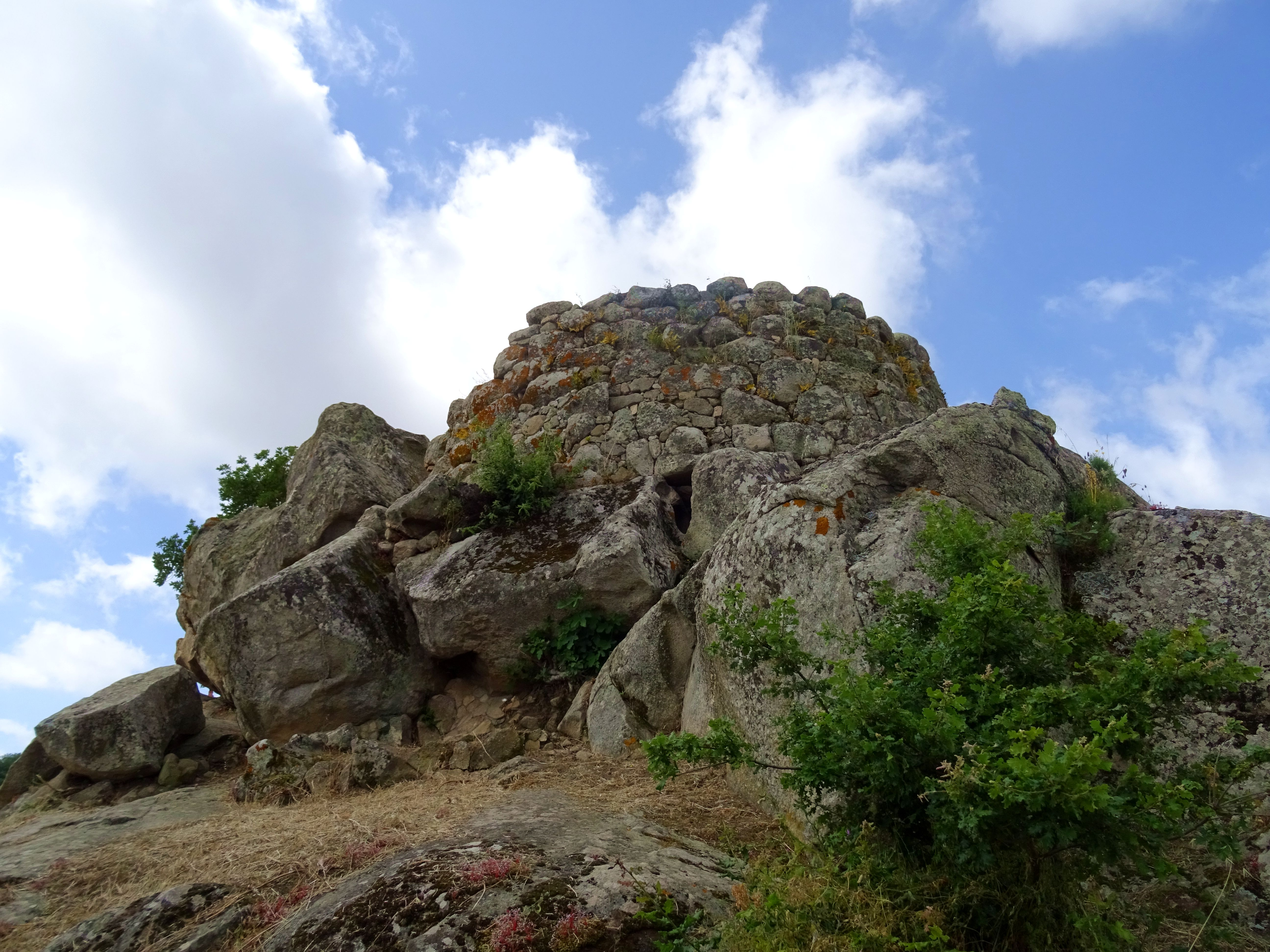 Nuraghe di Tanca Manna a Nuoro. This is a photo of a monument which is part of cultural heritage of Italy.